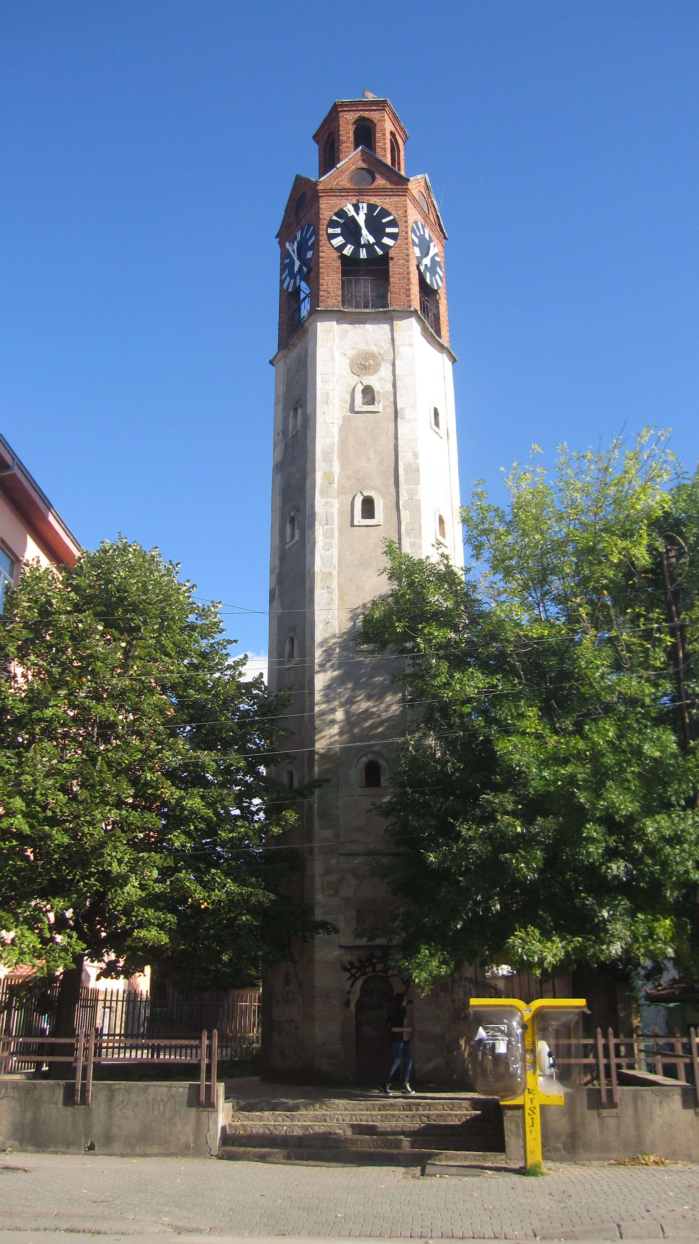 Sahat Kulla